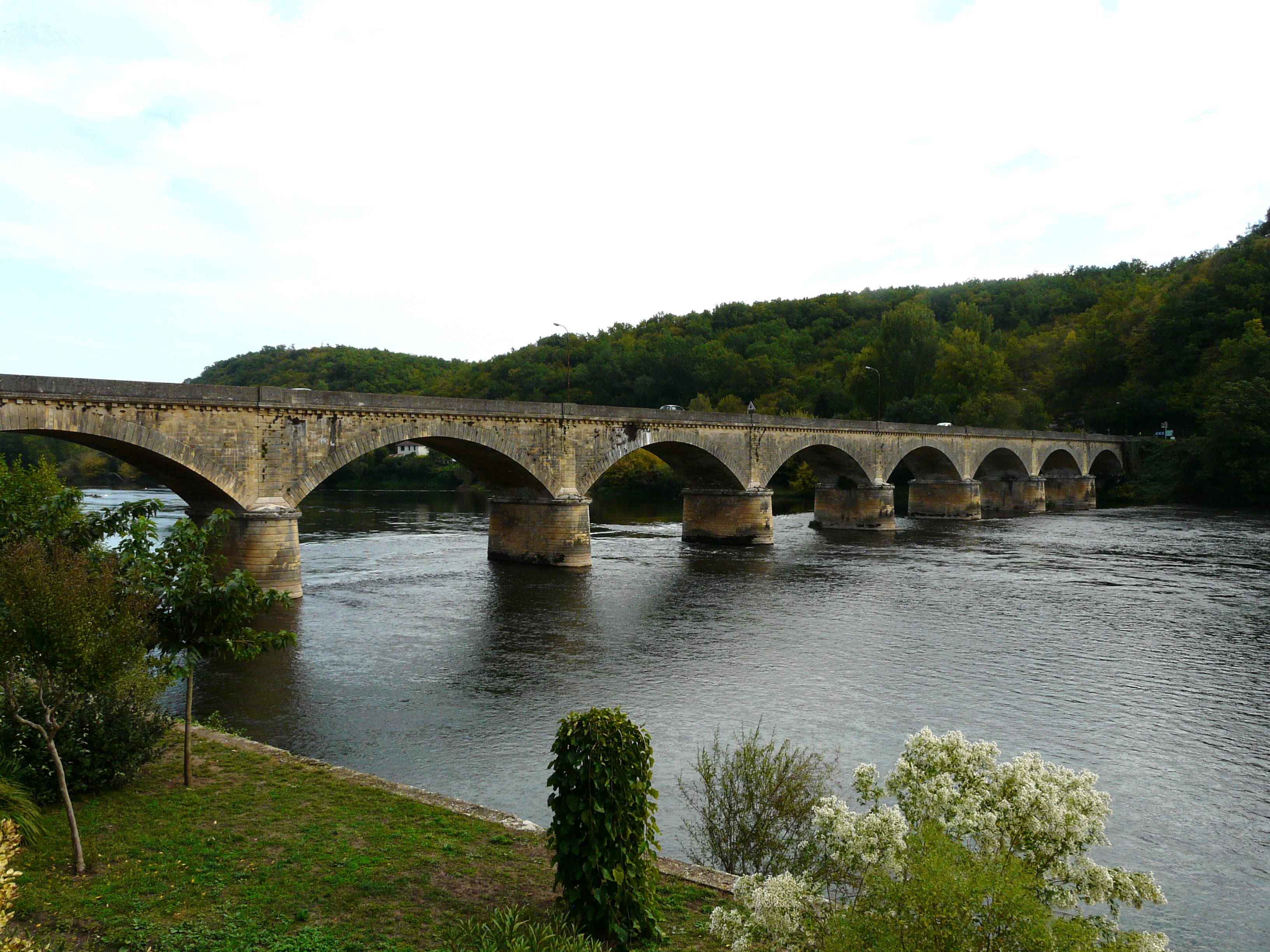 L'aval du pont de Lalinde sur la Dordogne vu depuis Lalinde en rive droite. La rive opposée se trouve sur Couze-et-Saint-Front ; Dordogne, France.